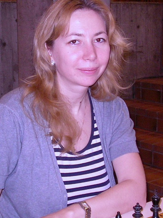 Irina Zakurdjaeva, Schachbundesliga der Frauen am 21. Januar 2012 in Karlsruhe.